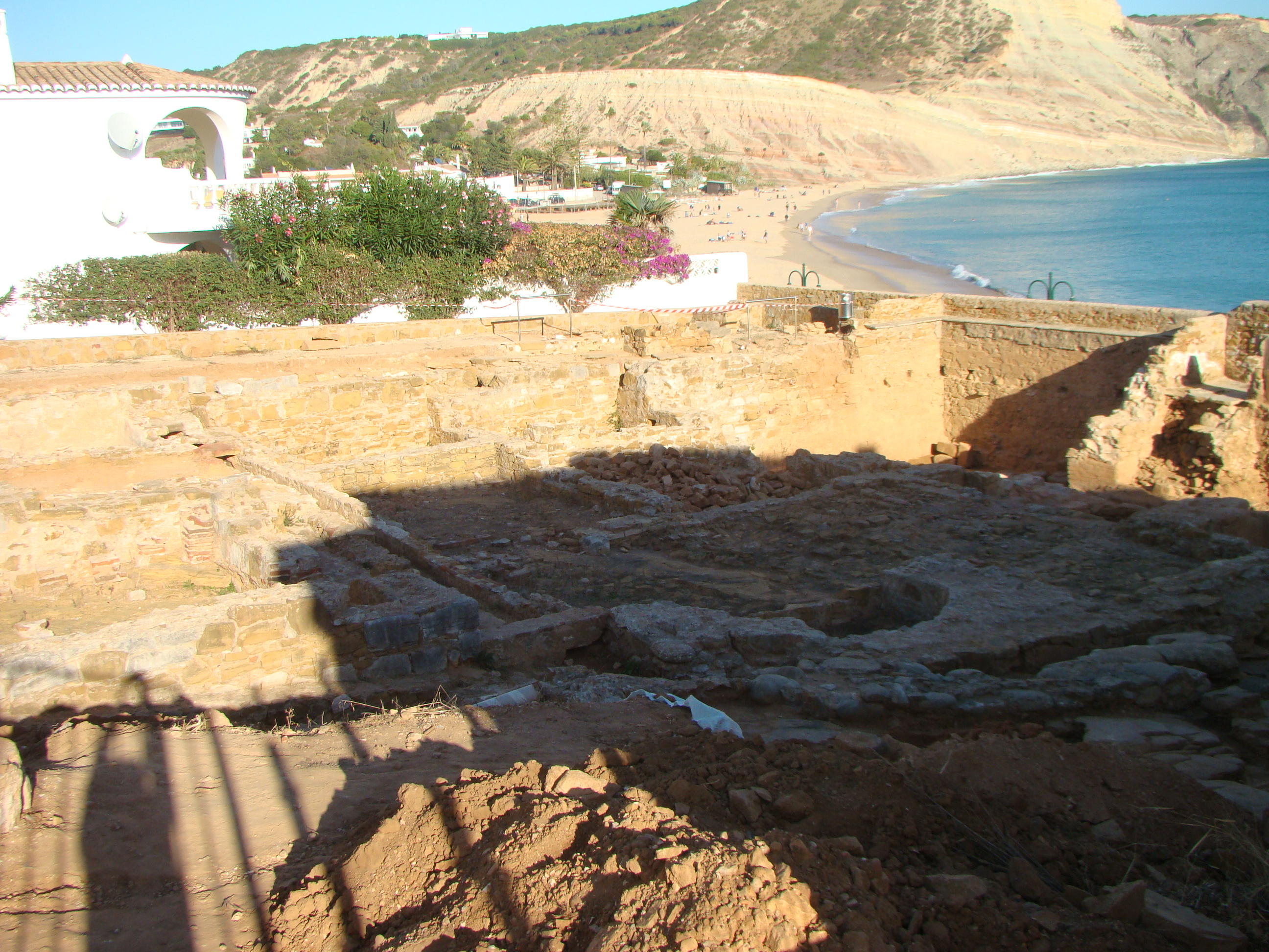 Ruinas Romanas da Praia da Luz.2